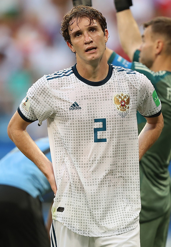 Холодный душ для команды Черчесова. Уругвай громит Россию